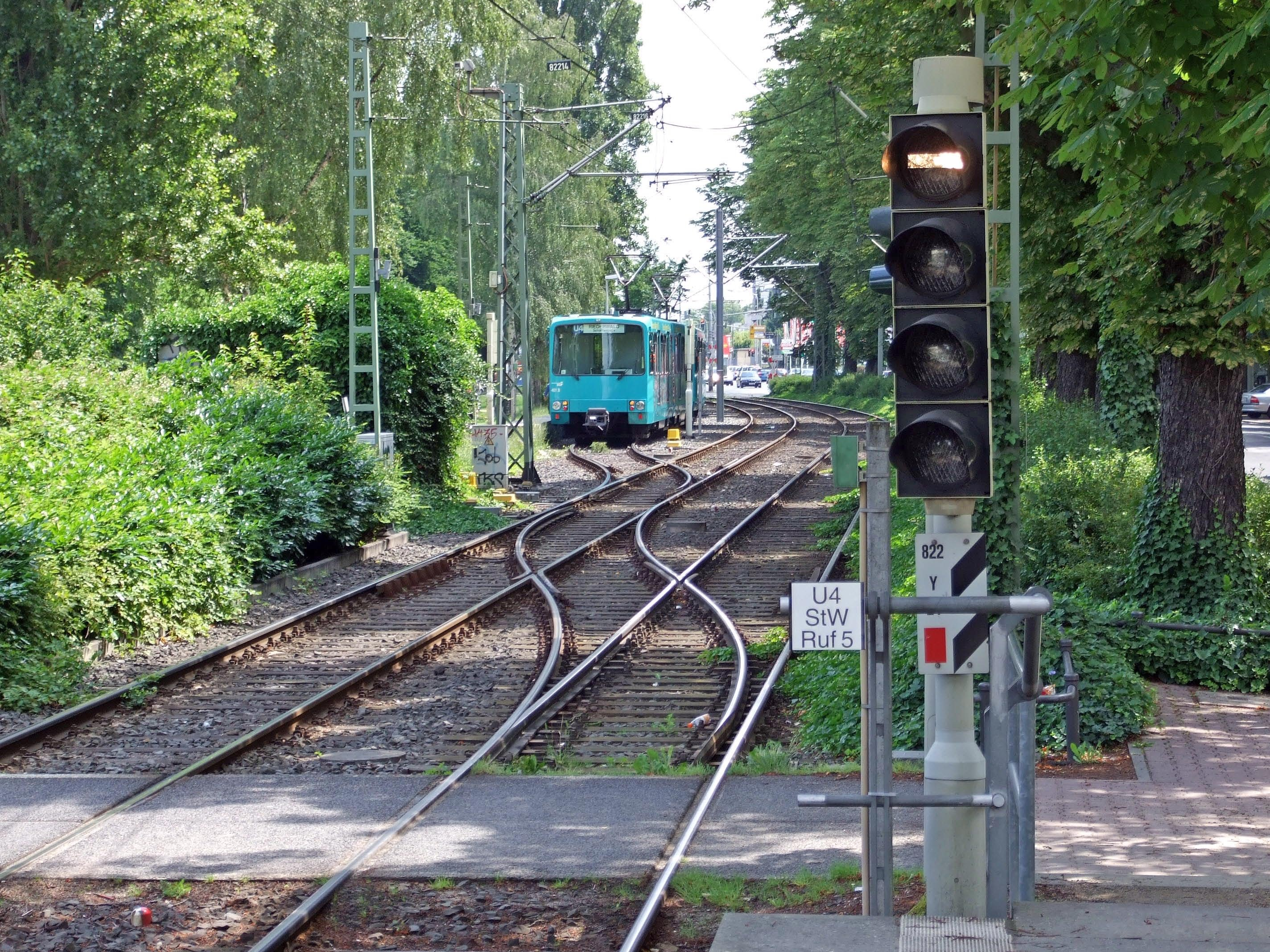 U4 Wendegleisanlage in Ffm-Riederwald, Station Schäfflestrasse (U4)